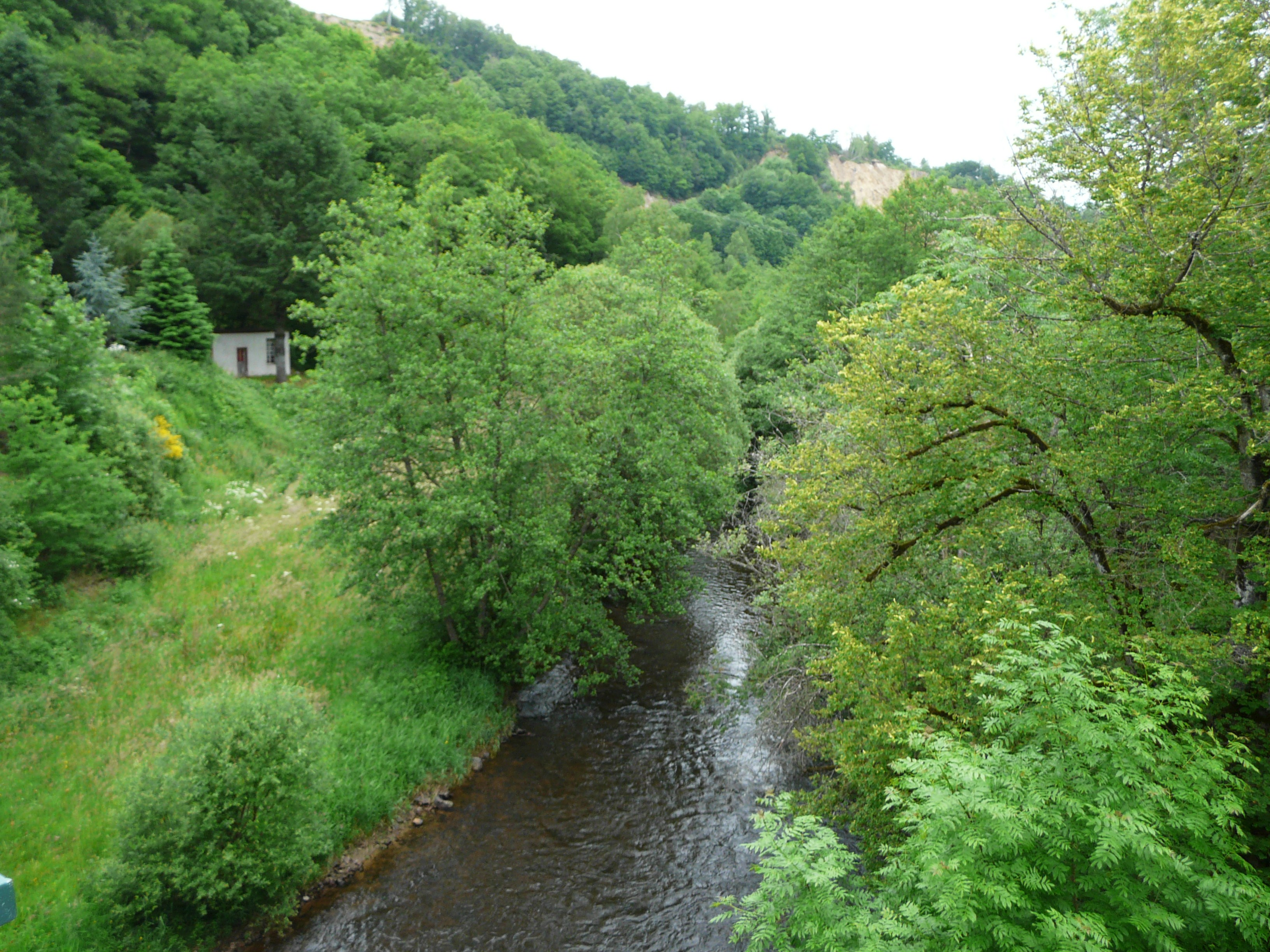 En amont du pont de la route départementale 2089, le Chavanon marque la limite entre les communes de Feyt (Corrèze, Limousin, à gauche) et Bourg-Lastic (Puy-de-Dôme, Auvergne, à droite).